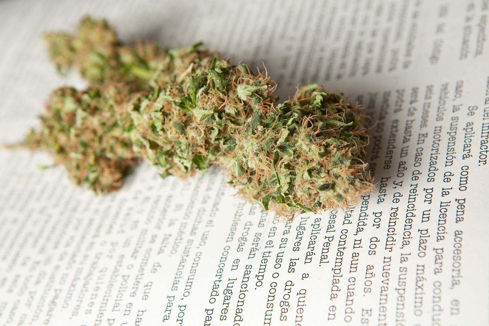 Cogoyo o flor de cannabis (marihuna), planta ilegal. Sobre la ley 20.000 (Ley de drogas y estupefacientes) que castiga su cultivo, poseción, porte y distribución.